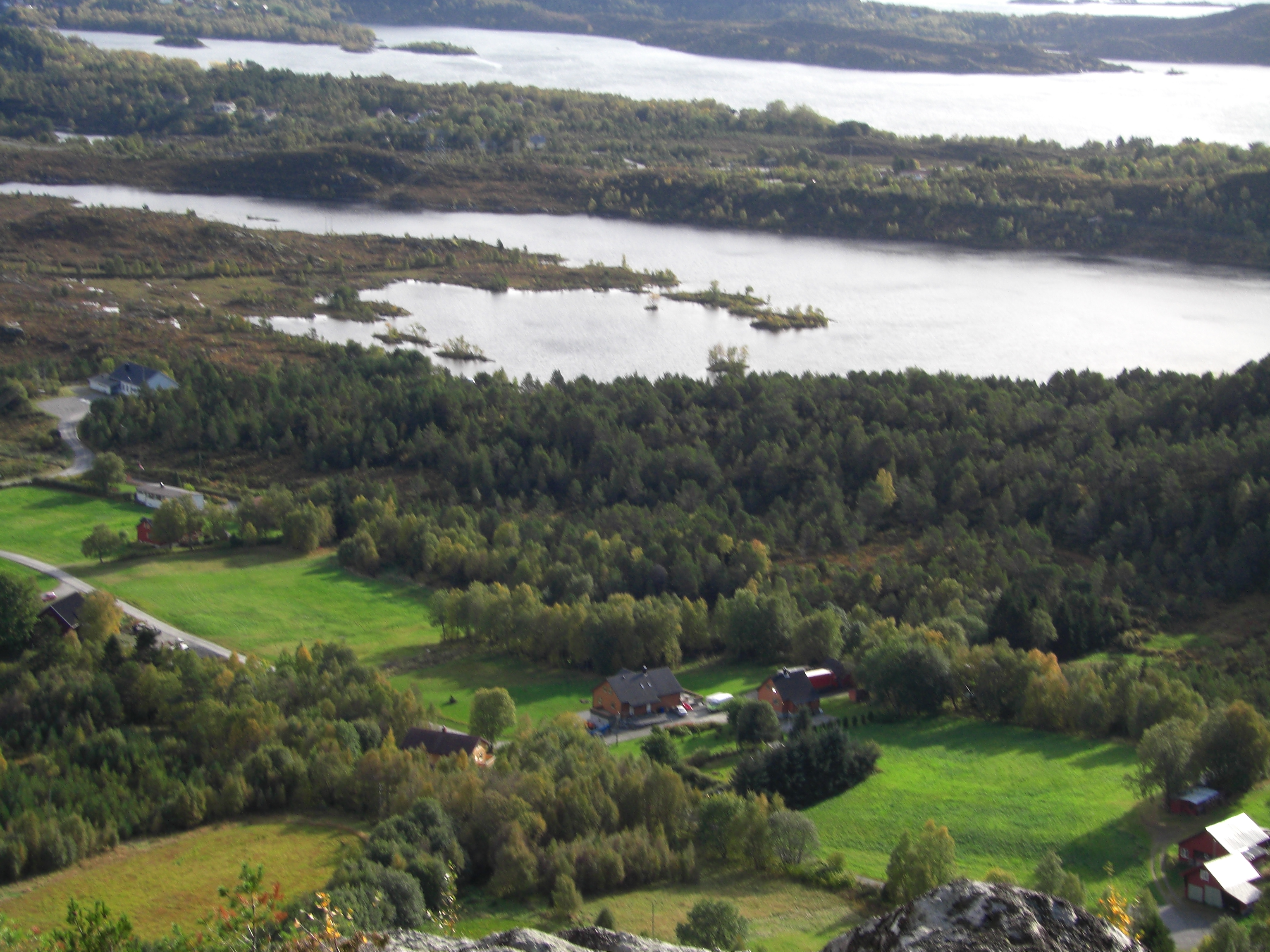 Myrvåg